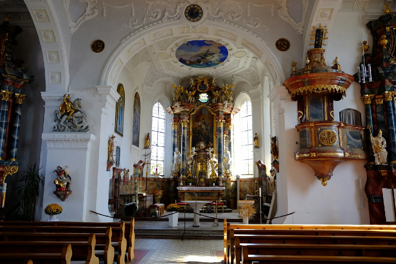 Wasserburg St Georg